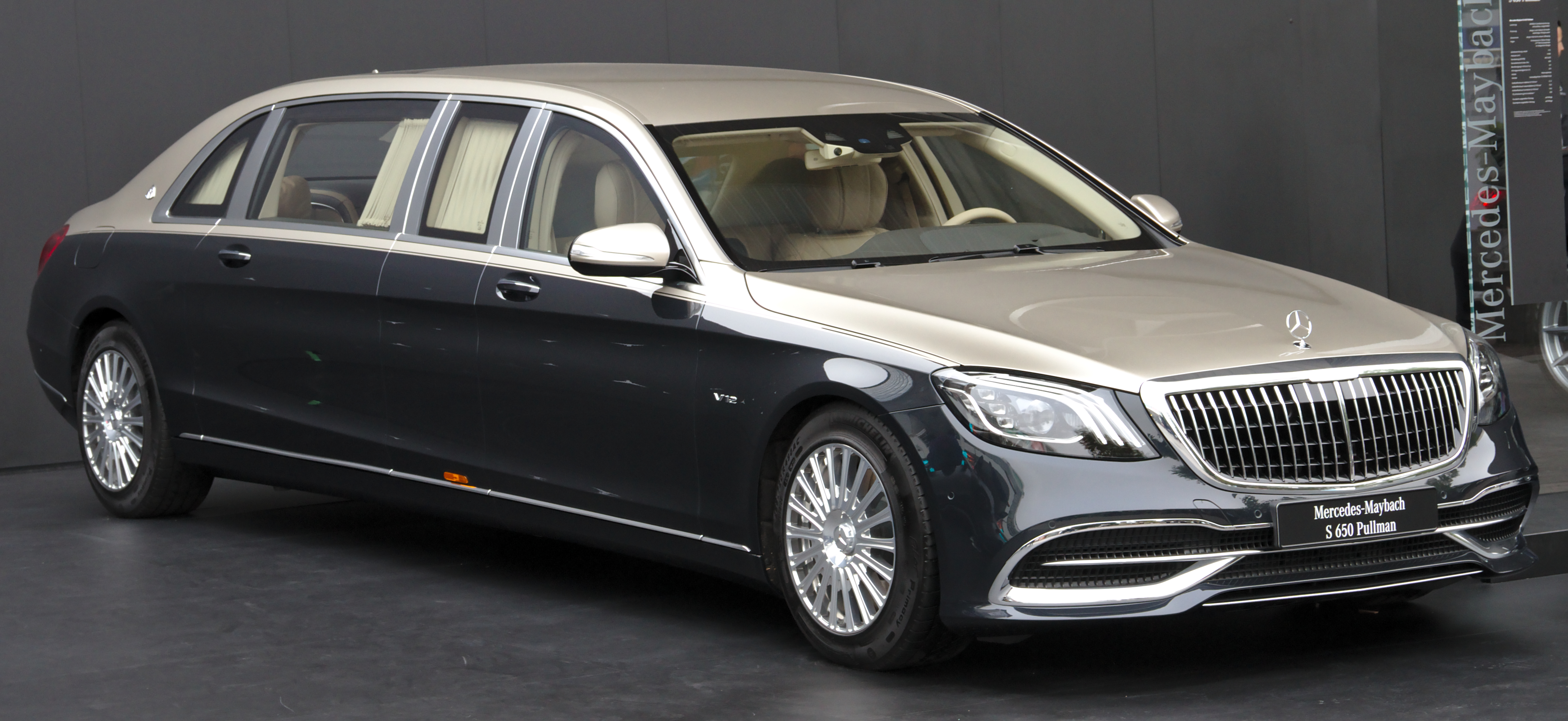 Mercedes-Maybach S 650 Pullman at IAA 2019